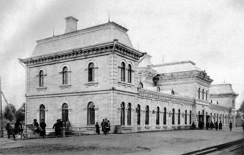 Xaçmaz Dəmiryol vağzalı